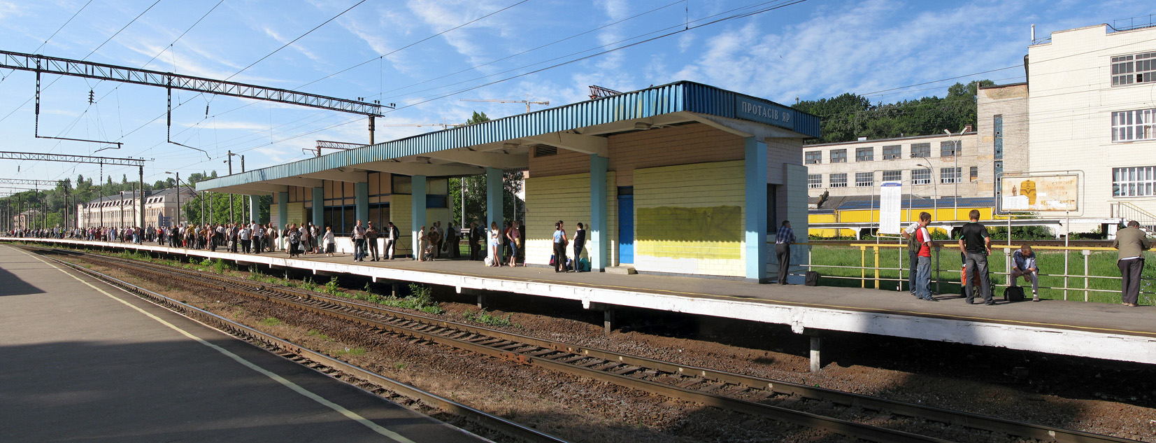 З.п. Протасів Яр